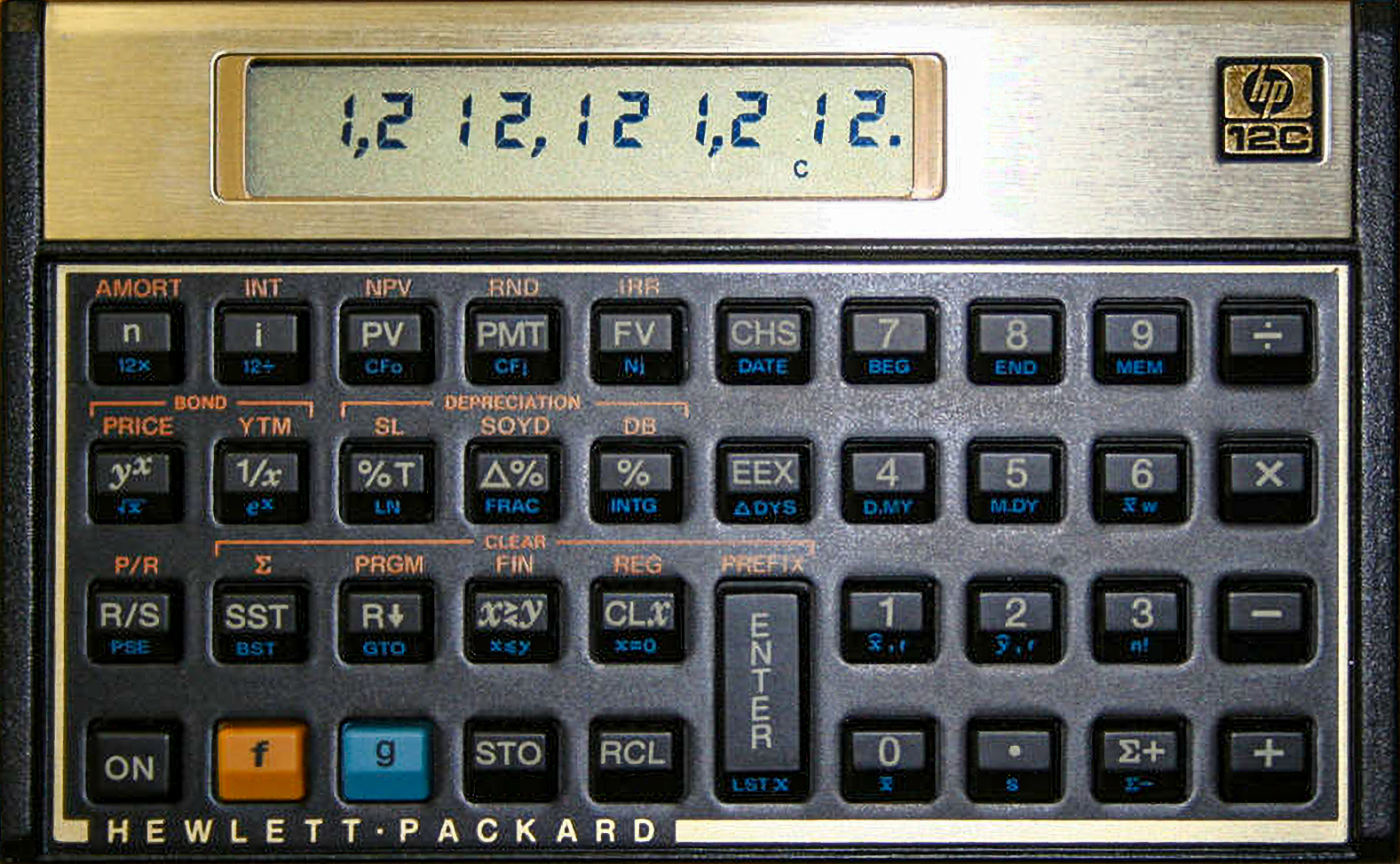 HP 12c